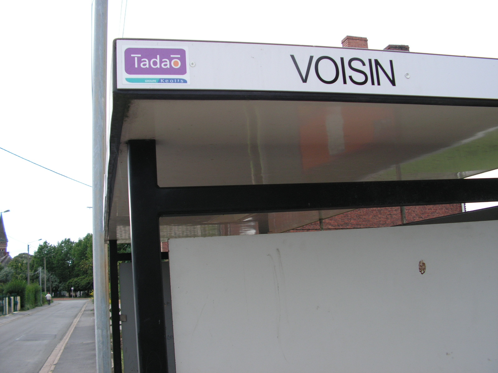 Arrêt de bus Tadao